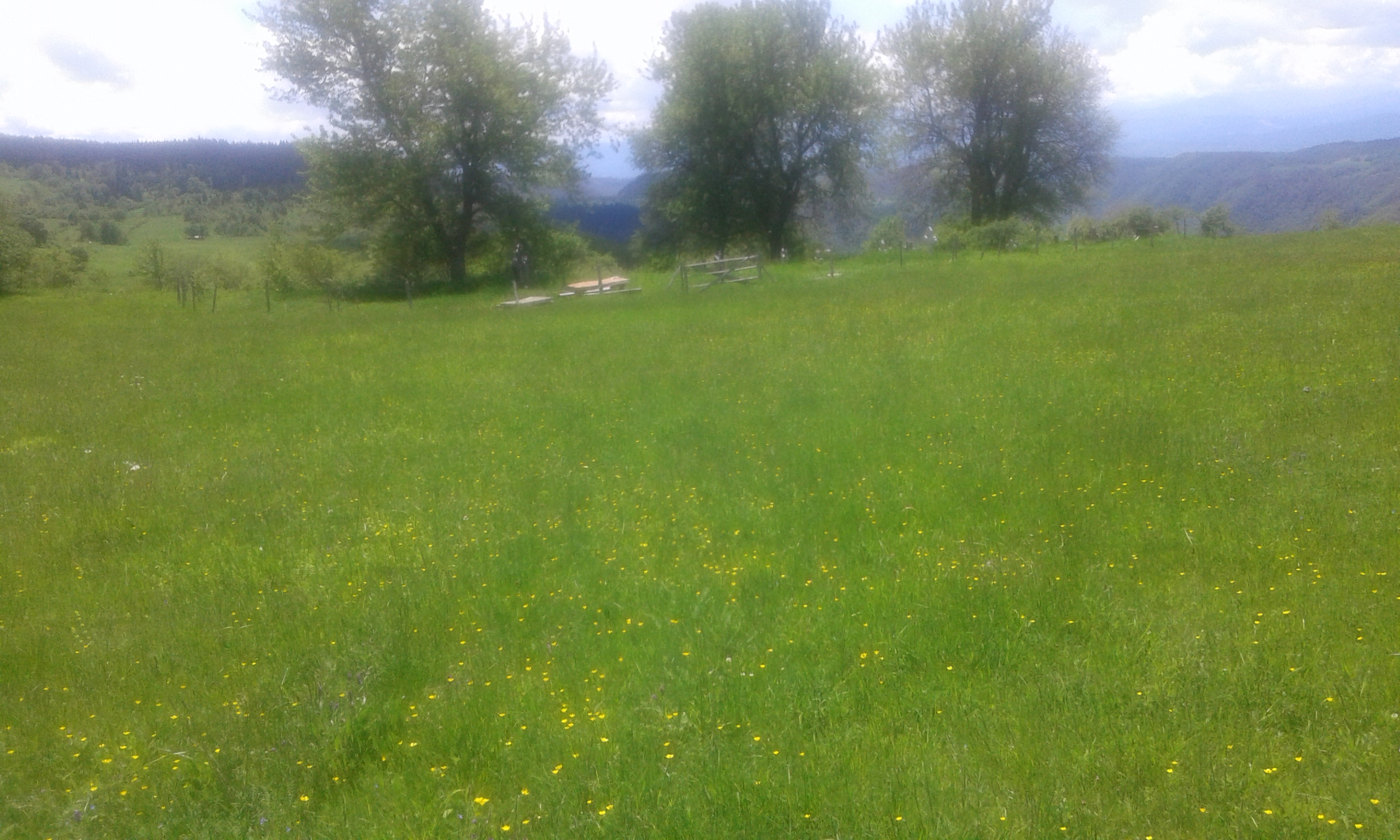 Српски (ћирилица): Панорама опустошеног села Чемерна у општини Илијаш, Кантон Сарајево, ФБиХ.